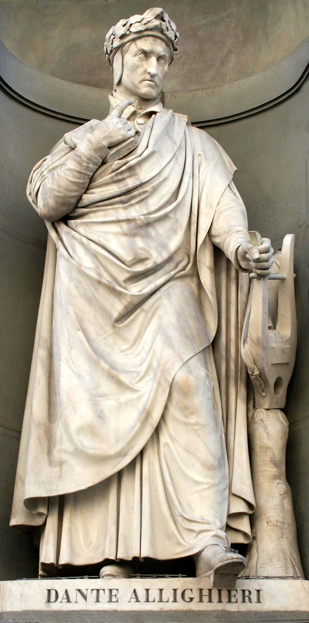 Statua di Dante Alighieri di Emilio Demi, sita a Firenze presso la Galleria degli Uffizi. Fotografata da Frieda (dillo a Ubi) il 18 settembre 2004.